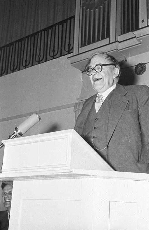 Ev. Gesellschaft in Wuppertal Jahresversammlung März 1956 Karl Barth